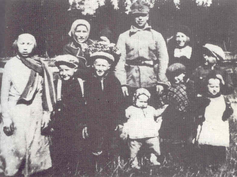 Hemkomst till hembyn i Österbotten efter Finska vinterkriget, våren 1940. Ett fotografi i Harri Blombergs ägo. Uppladdaren av bilden (Harri Blomberg) är innehavaren av bilden. Bilden föreställer uppladdarens farfar, farmor och far med syskon.